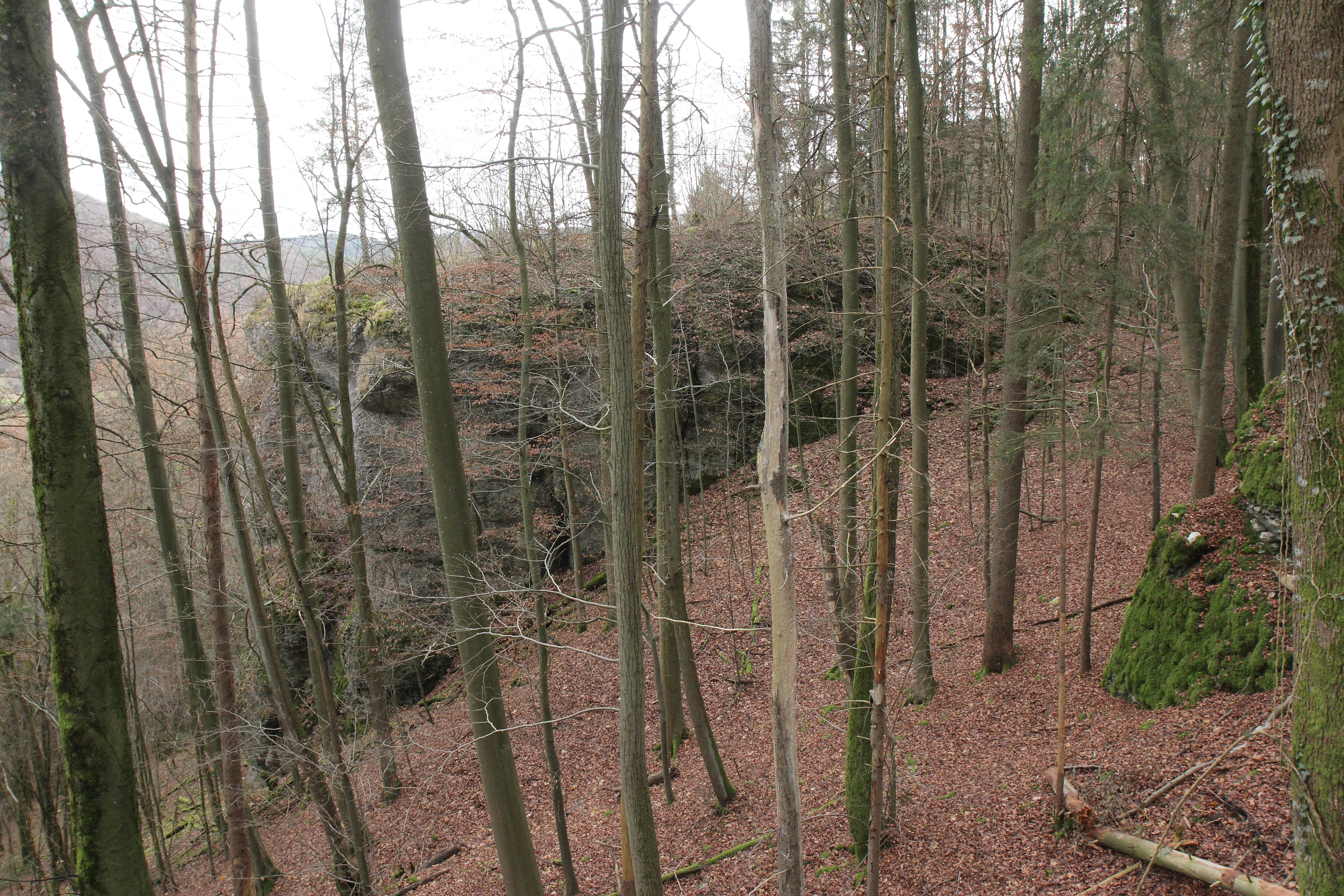 Burgstall Altes Schloss - Burgfelsen aus nordwestlicher Richtung